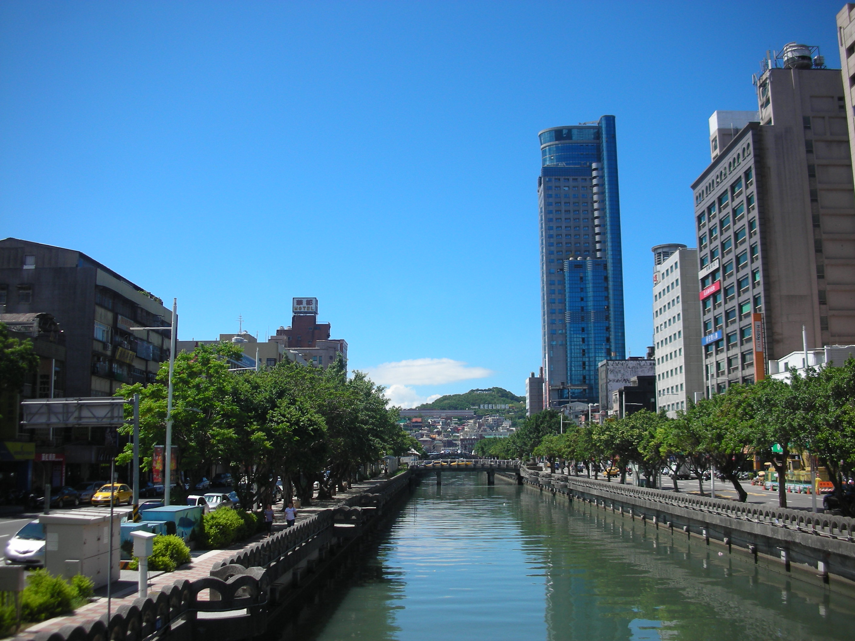 基隆田寮河風光